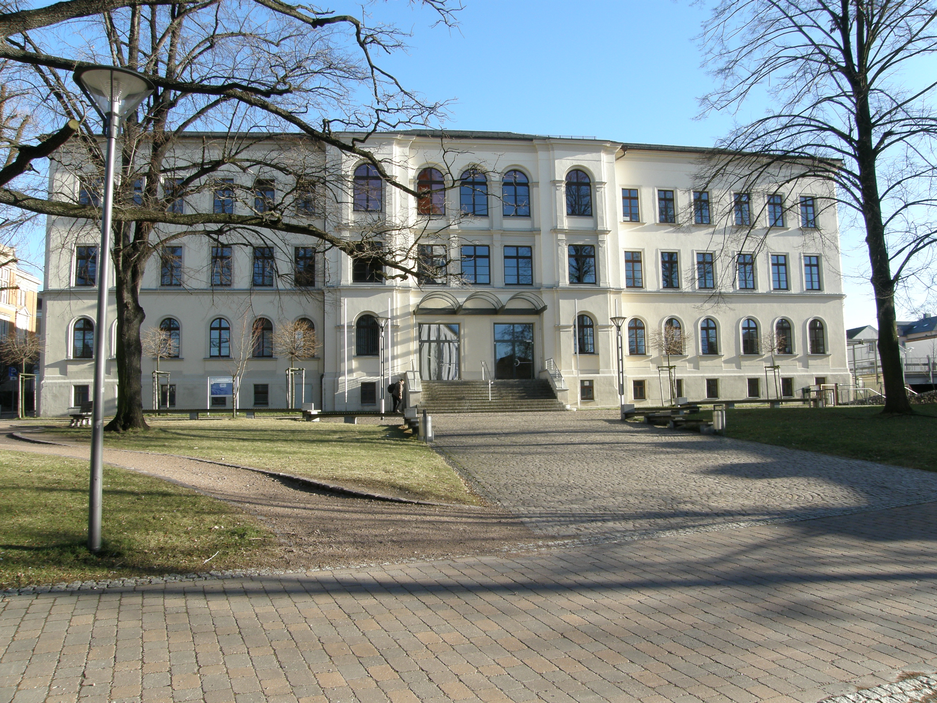 Frankenberg/Sa., Martin-Luther-Gymnasium nahe dem Markt